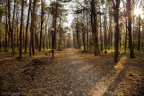 Владикавказский дендрарий: к юго-западу от города, у подножья Лысой горы,Владикавказ, Северная Осетия This image is related to the protected area of Russia number 1510150